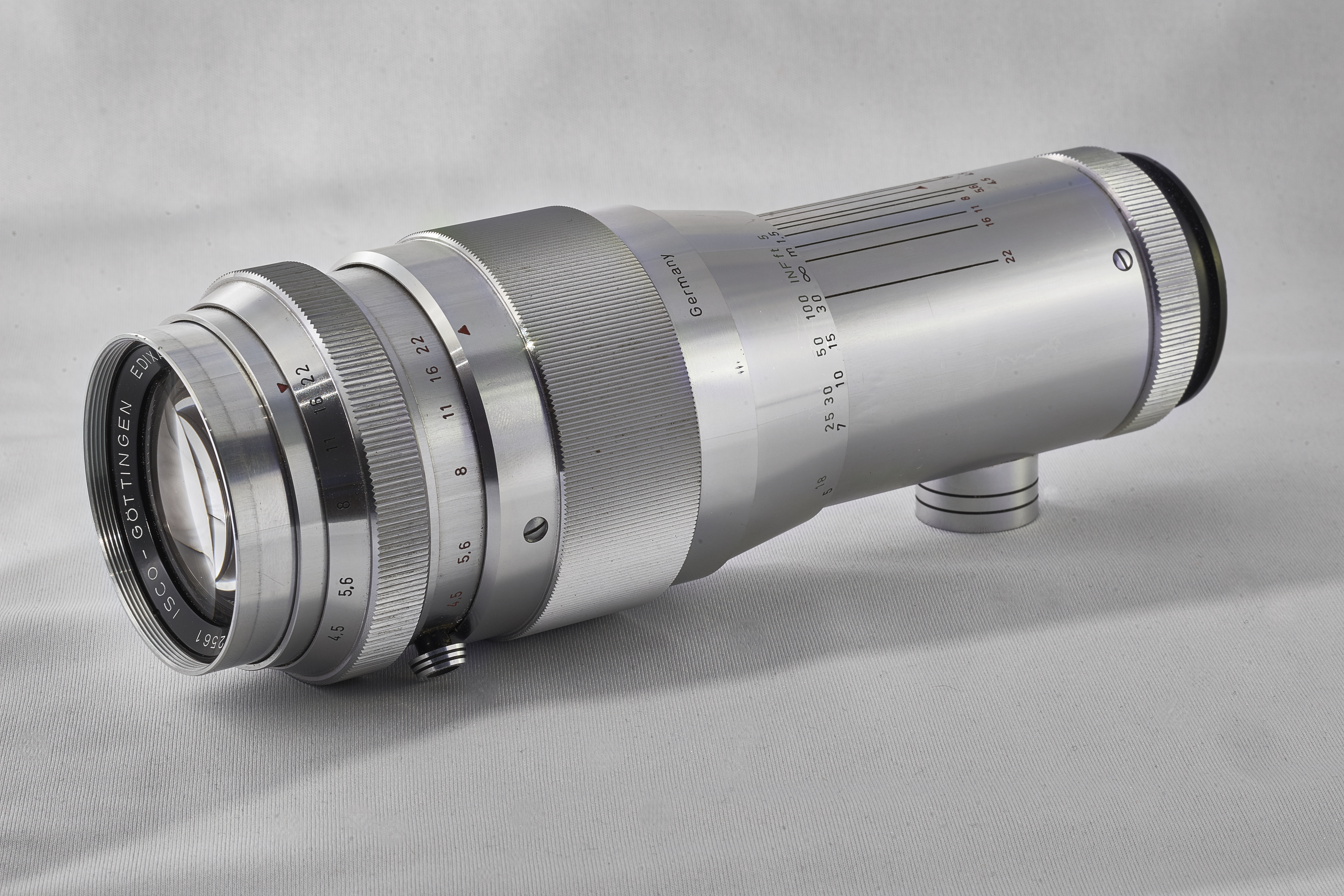 Objektiv / Lens ISCO Edixa Westanar 1:4 / 180 mm Tele